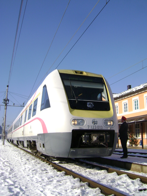 HŽ serija 7 123 u Moravicama